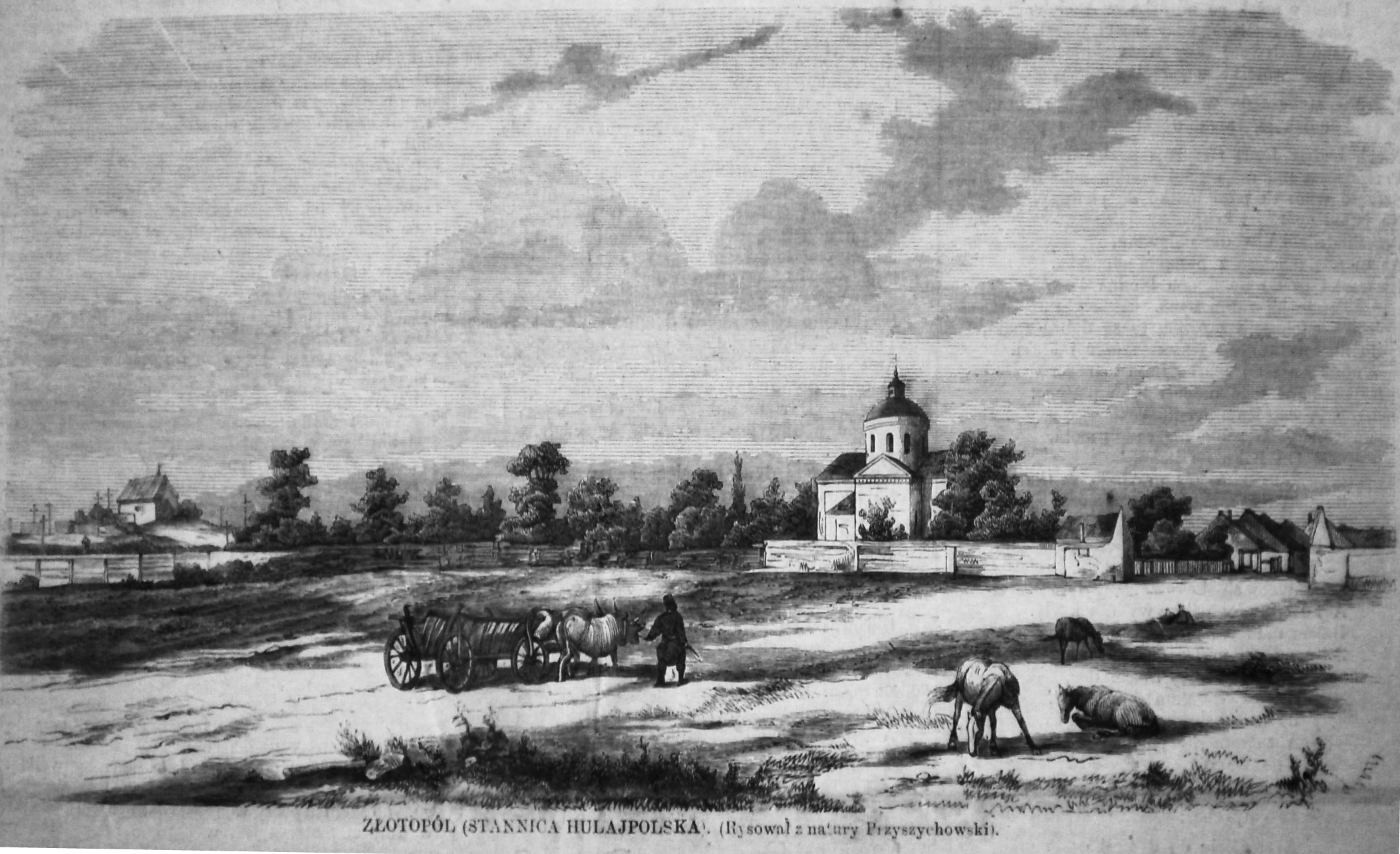 ZŁOTOPÓL (STANNICA HULAJPOLSKA). Wycinek, zachowany tekst autorstwa Tadeusza Padalicy. Kościół poświęcony 1817 (erekcja 1807), gruntownie przebudowany 1861, zob. ww. tekst i SGKP t.14 s.643. Dawny powiat czehryński.